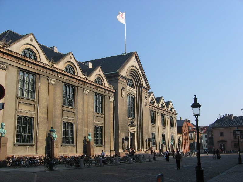 Hovedbygningen, Københavns Universitet